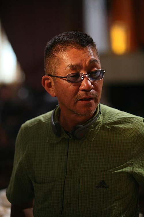 日本の映画監督